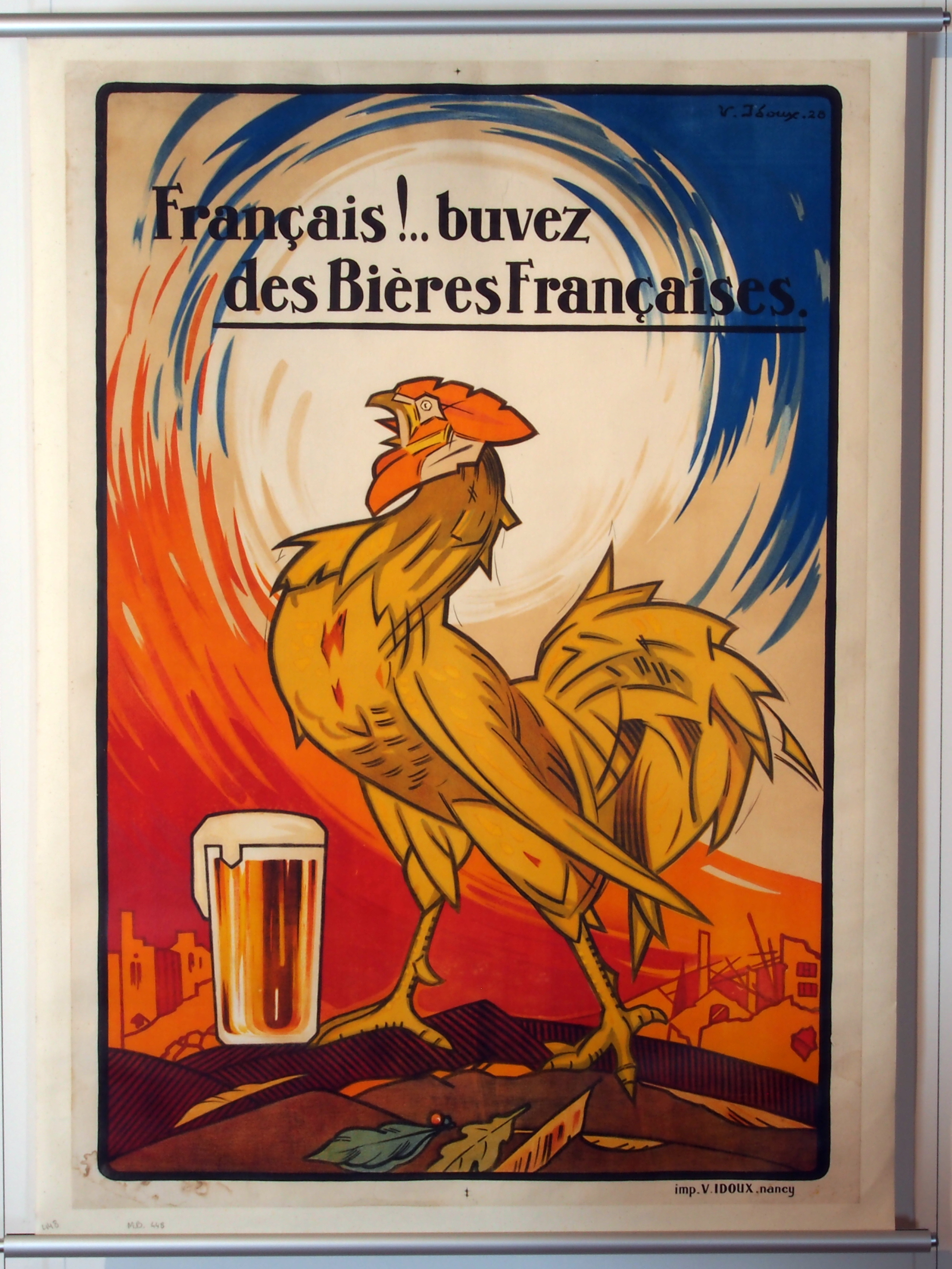 Bières Françaises.